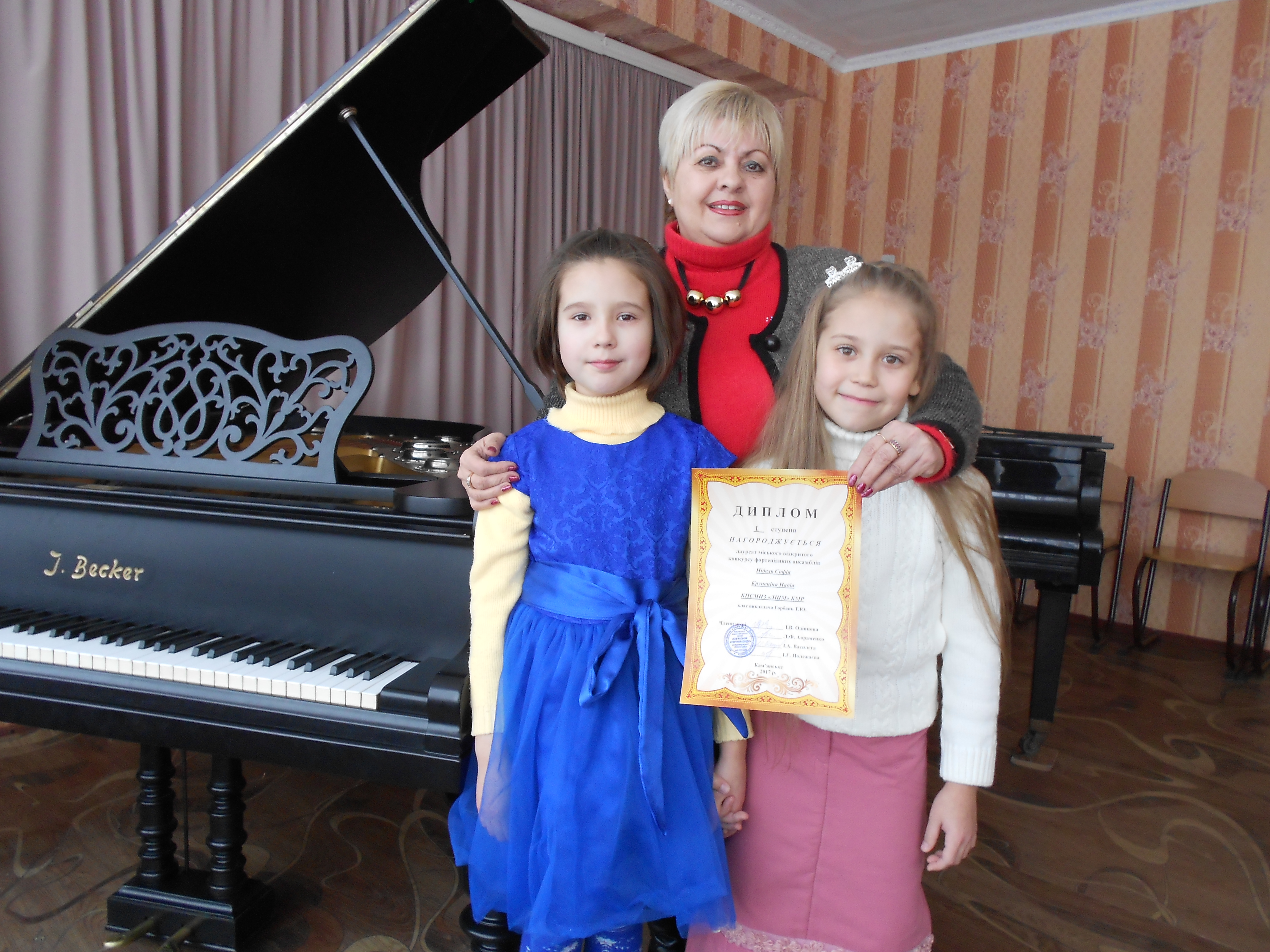 Лауреаты I ступени городского открытого конкурса фортепианных ансамблей